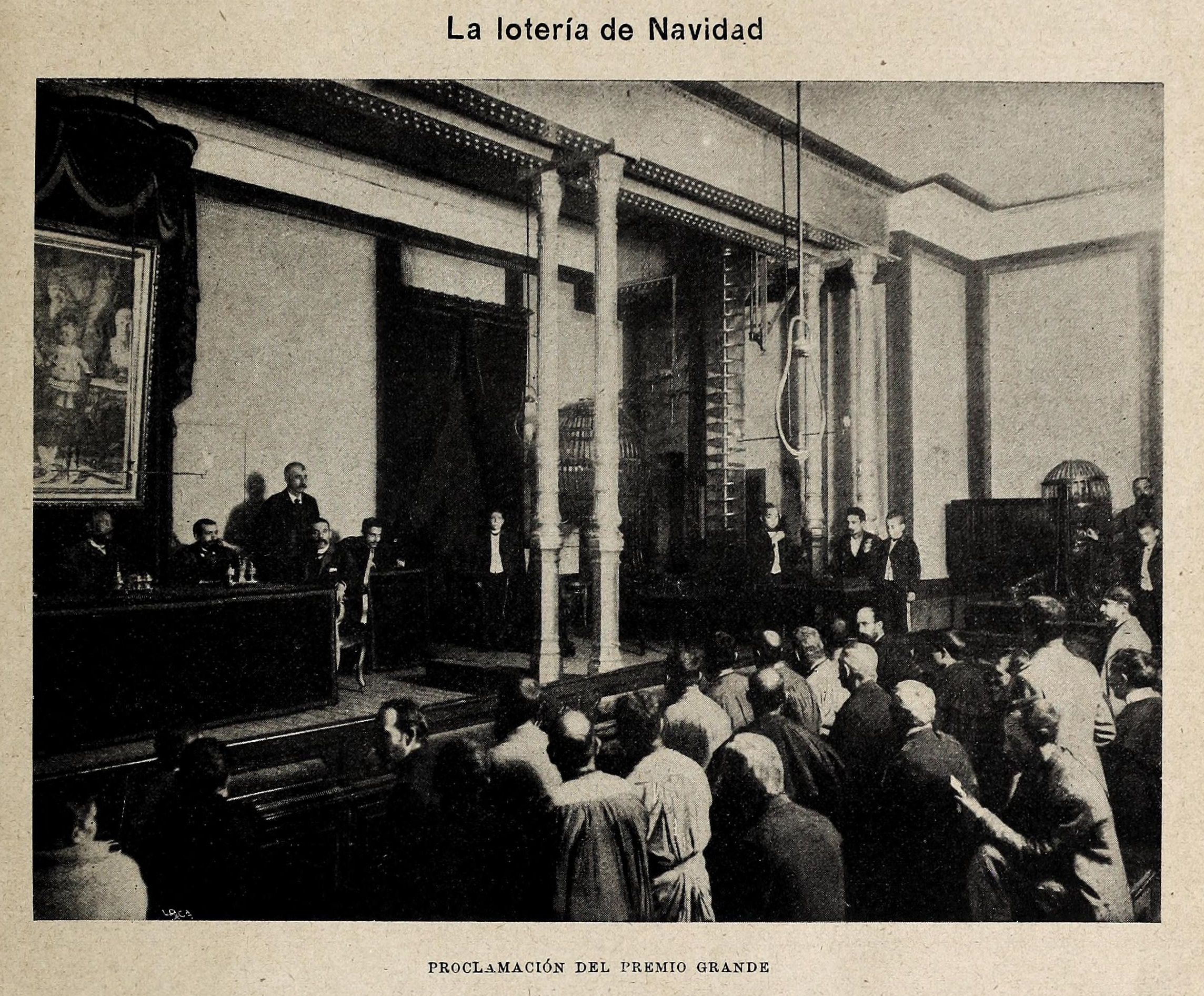 ACTUALIDADES. Lotería de Navidad Proclamación del Premio Grande. Fotog. de Franzen, hecha durante el sorteo.